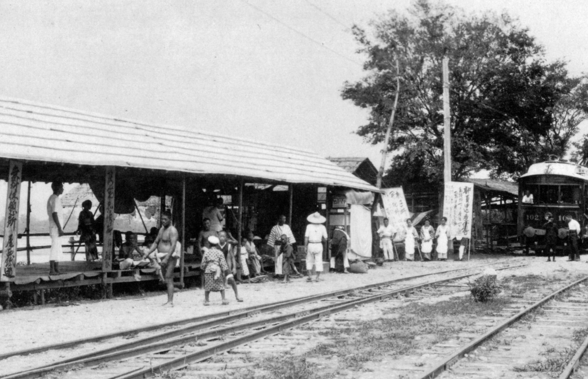 木曽川港駅は貨物駅だが水泳旅客用に臨時電車が運行された